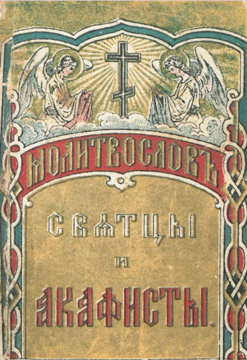 Никольский А. А. Молитвослов. Москва 1883.